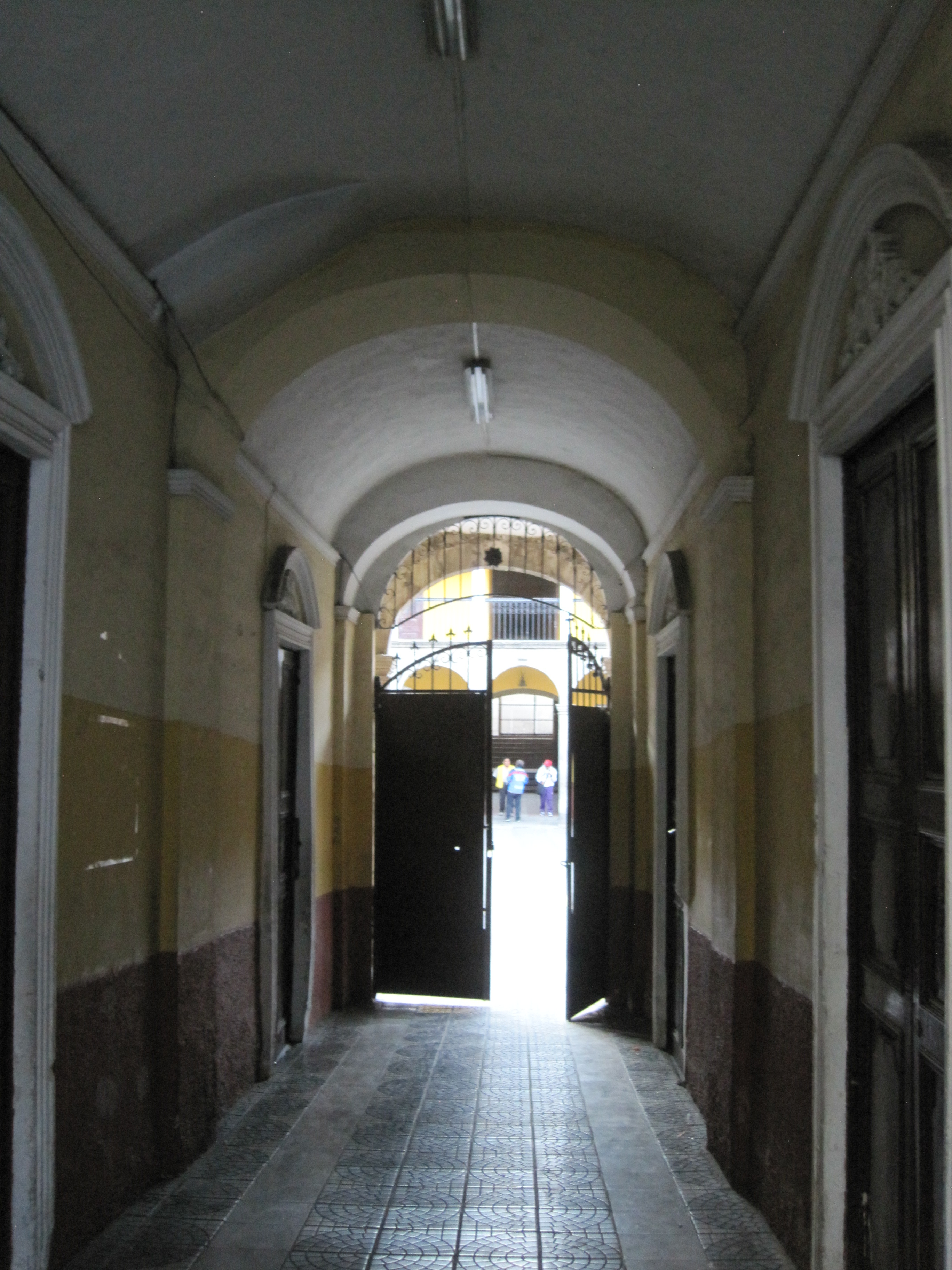 Colegio Nacional Simón de Ayacucho Interiores. This medium shows the protected monument with the number L/00-049 in Bolivia.